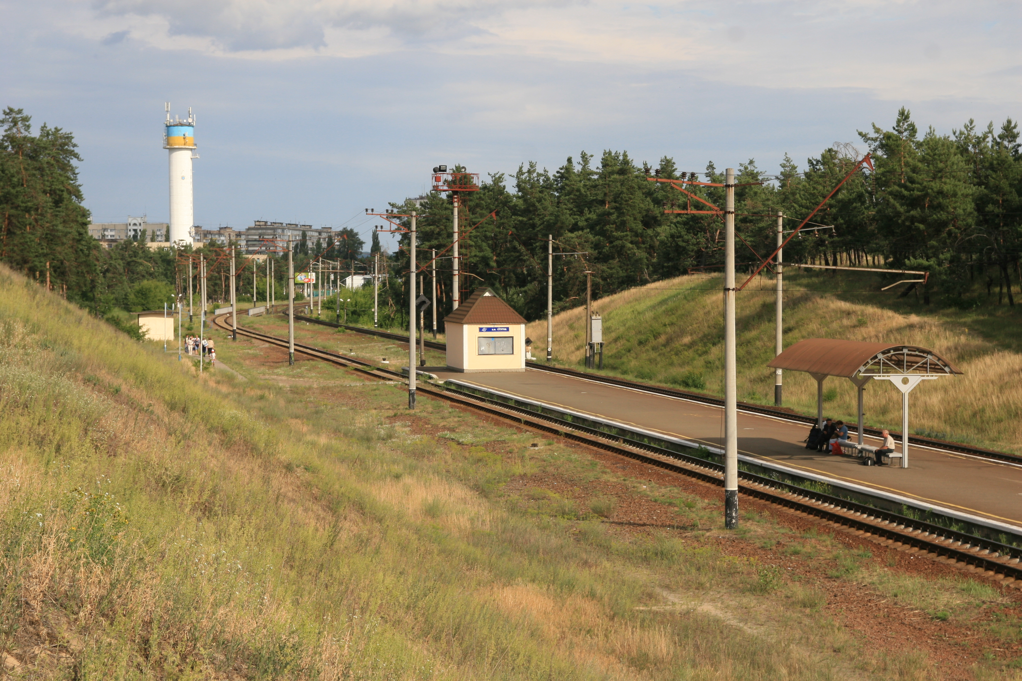 Залізничний зупинний пункт Стугна в місті Українка, Київська область, Україна